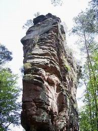 Aufnahme zeigt eine Felsnadel im Pfälzerwald. Genauer: den Geierturm an den Luger Geiersteinen, Westkante, Photographiert 06/2003 von Benutzer:Sansculotte. Bild ist unter der GNU FDL zur weiteren Verwendung freigegeben. Quellenangabe und Beleg an erbeten.